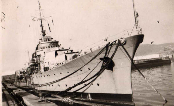 Crucero Español Méndez Núñez en los años 50